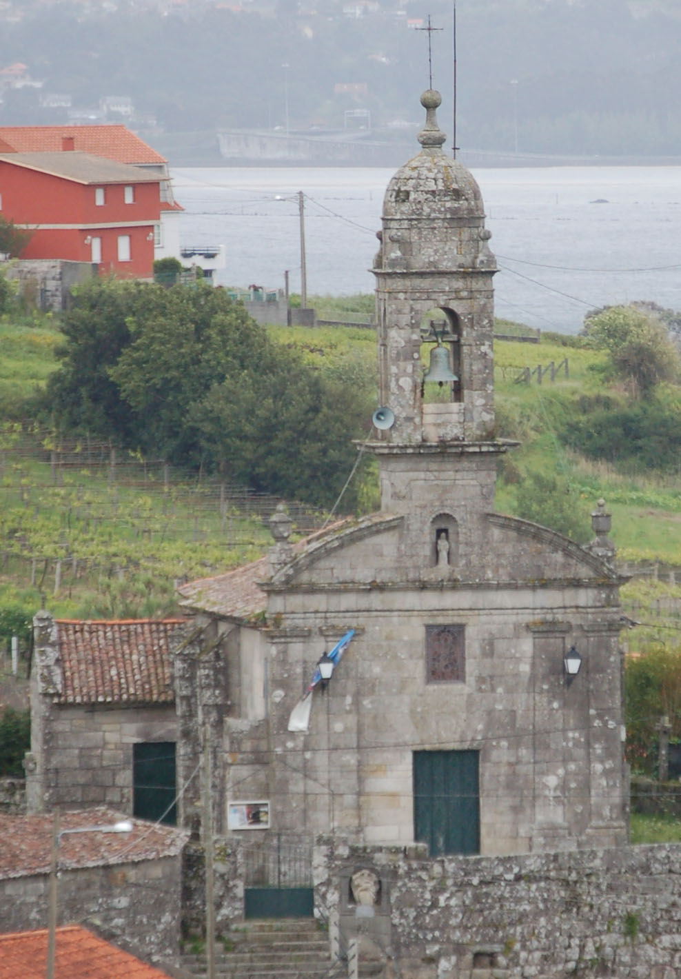 Igrexa parroquial de Santa María de Samieira (Poio)